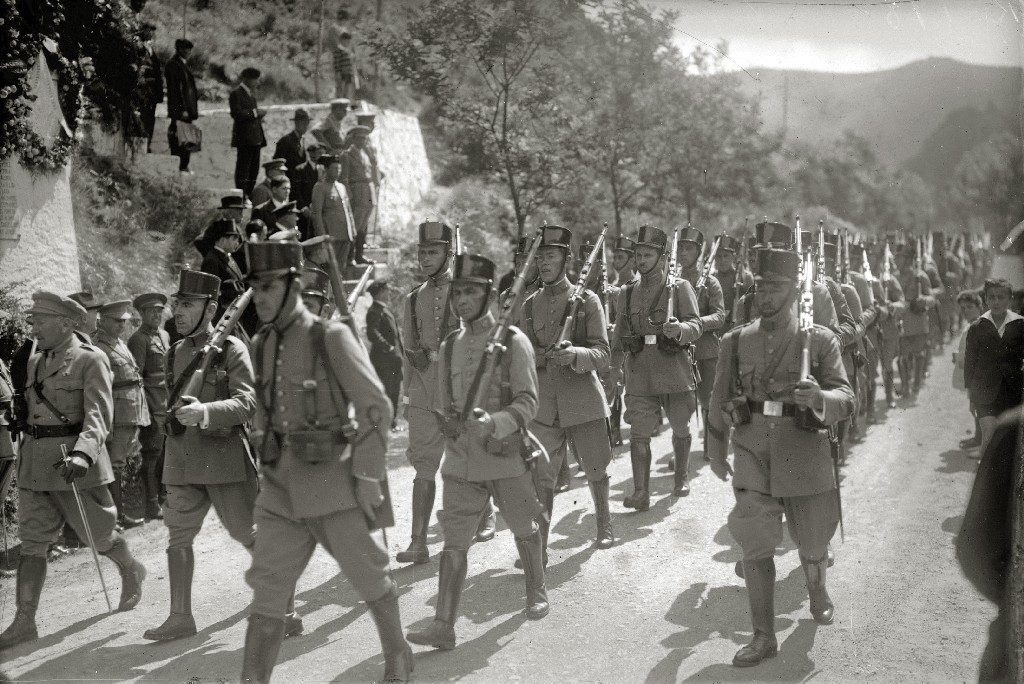 Título original: Celebración de un acto castrense en honor a las víctimas del fusilamiento de Endarlaza en la localidad de Irun (5/6) Localización: Irún (Guipúzcoa)